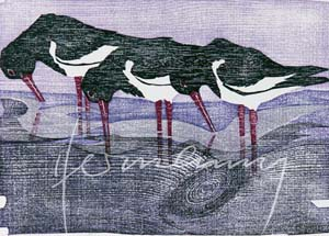 Gerhard Hermanns, Farbholzschnitt, Titel: Austernfischer